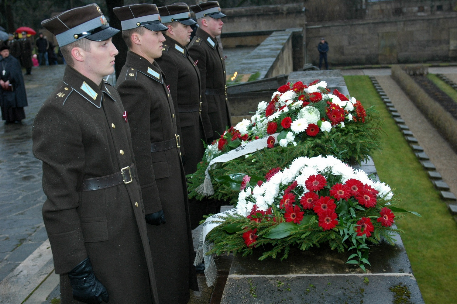 2010.gada 11.novembris. Rīgas Brāļu kapos pie Mūžīgās uguns notiek svinīgā vainagu nolikšanas ceremonija. Foto: Saeima.